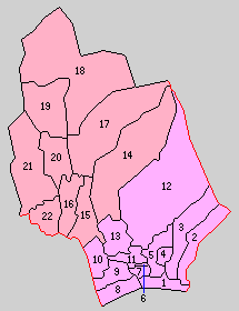 静岡県富士郡の町村。